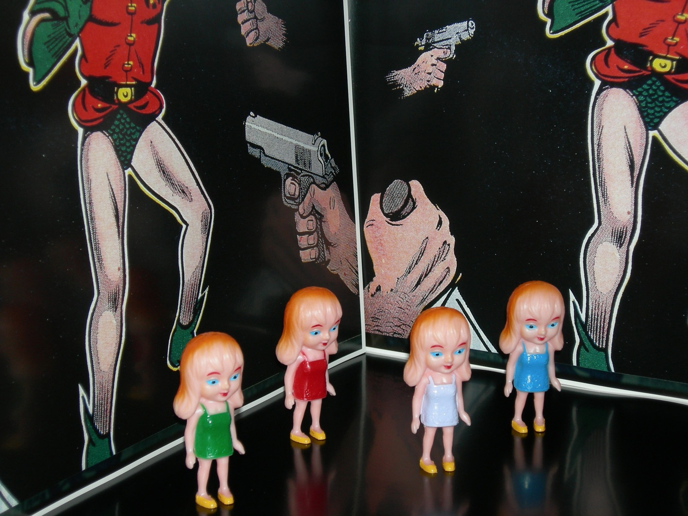 מקט חלון ראווה 2008